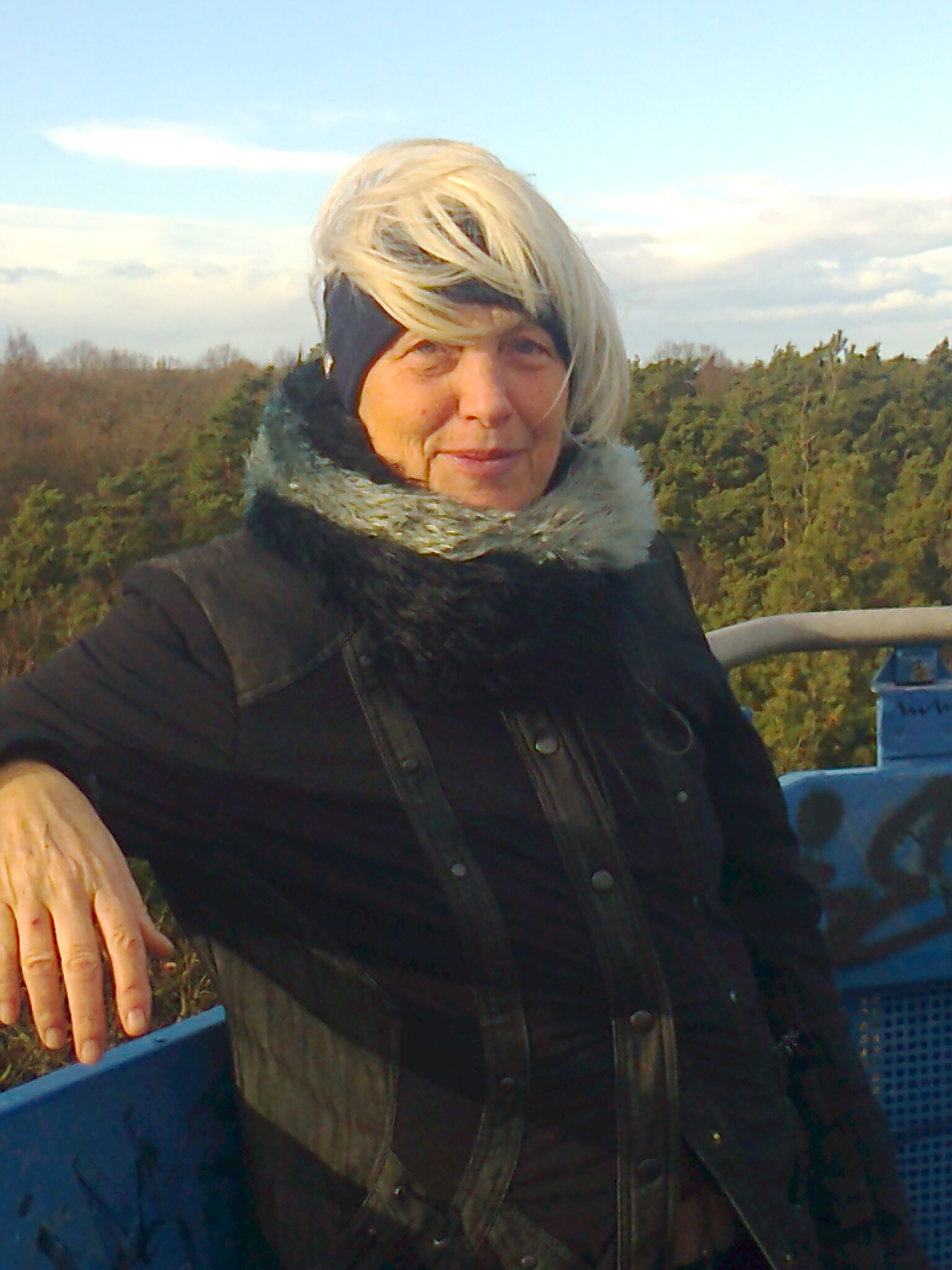 Foto Chr. Seidel